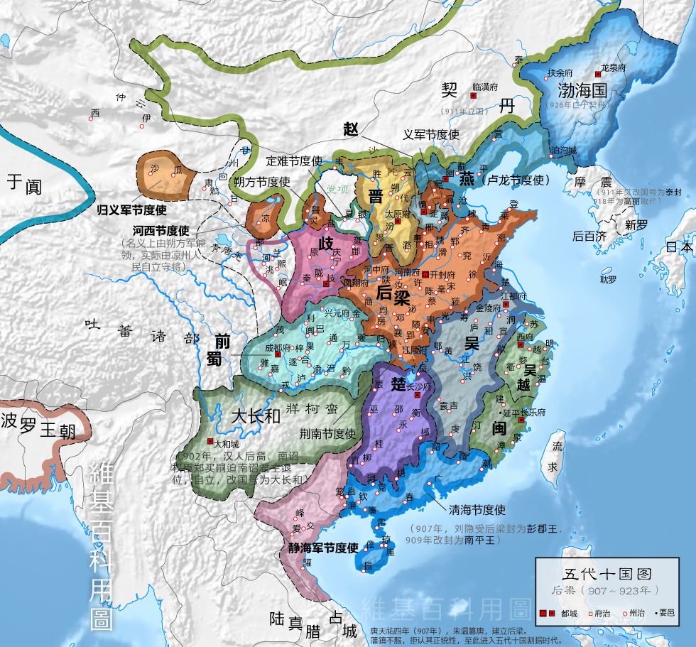 后梁前期